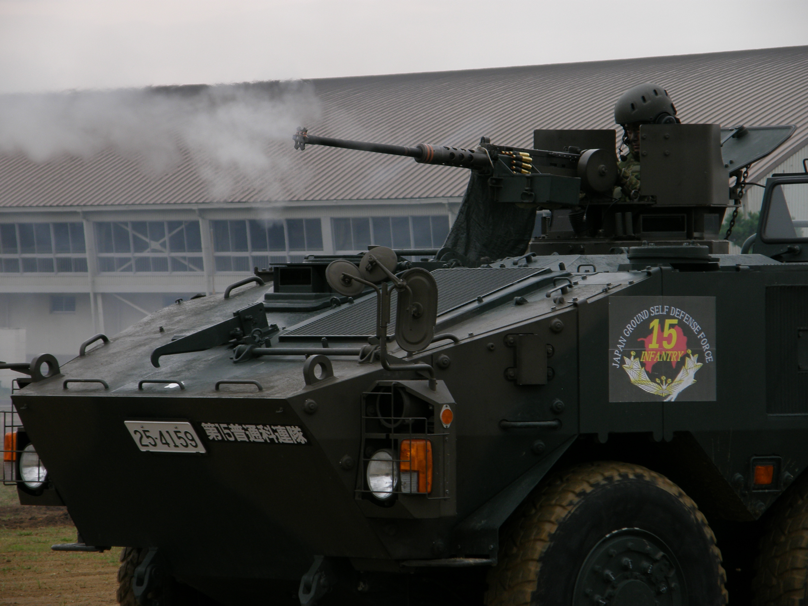 第15普通科連隊第2中隊所属車